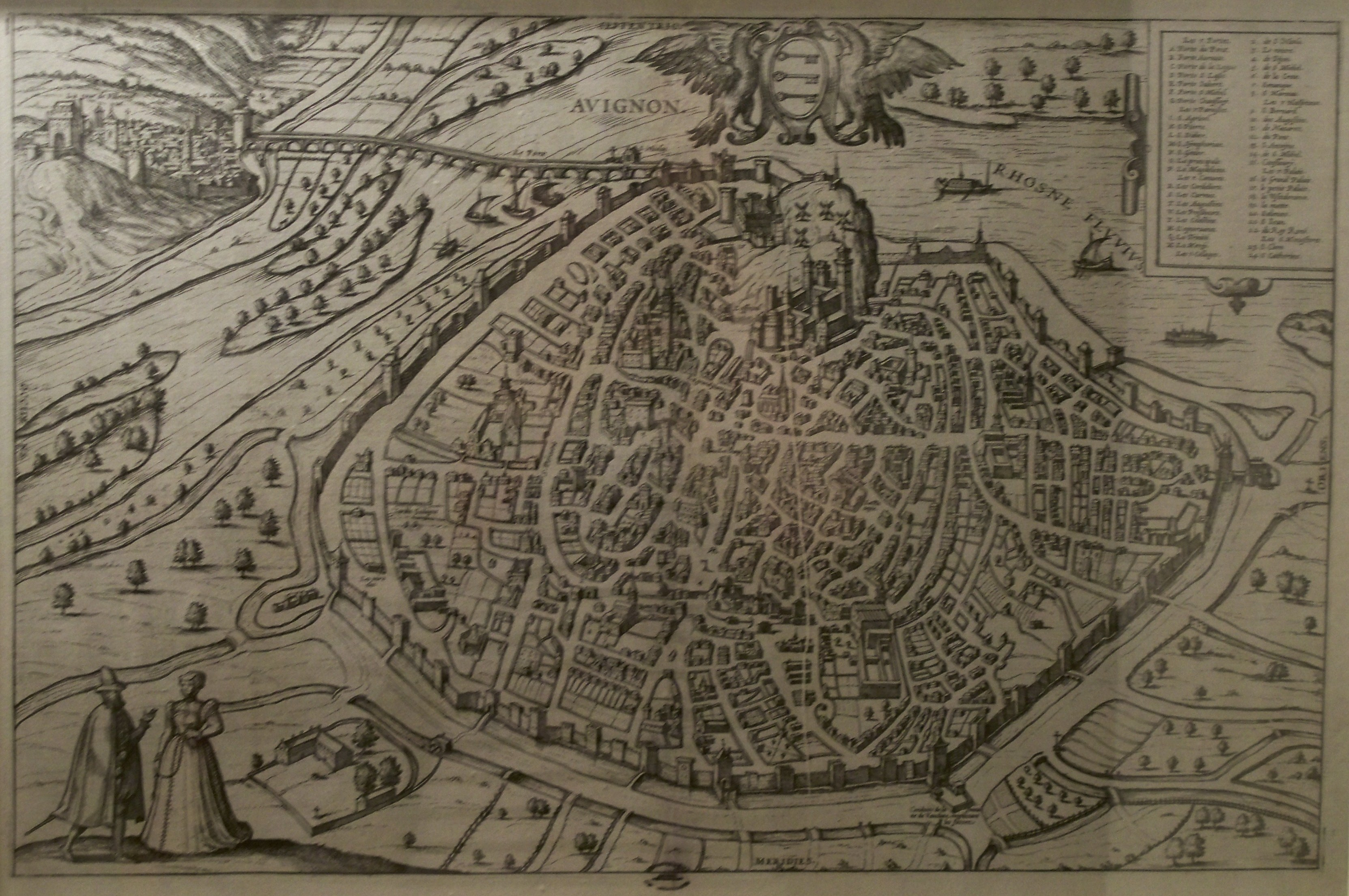 Plan de la ville d'Avignon et de ses alentours en 1572, connu sous le nom Plan aux Personnages